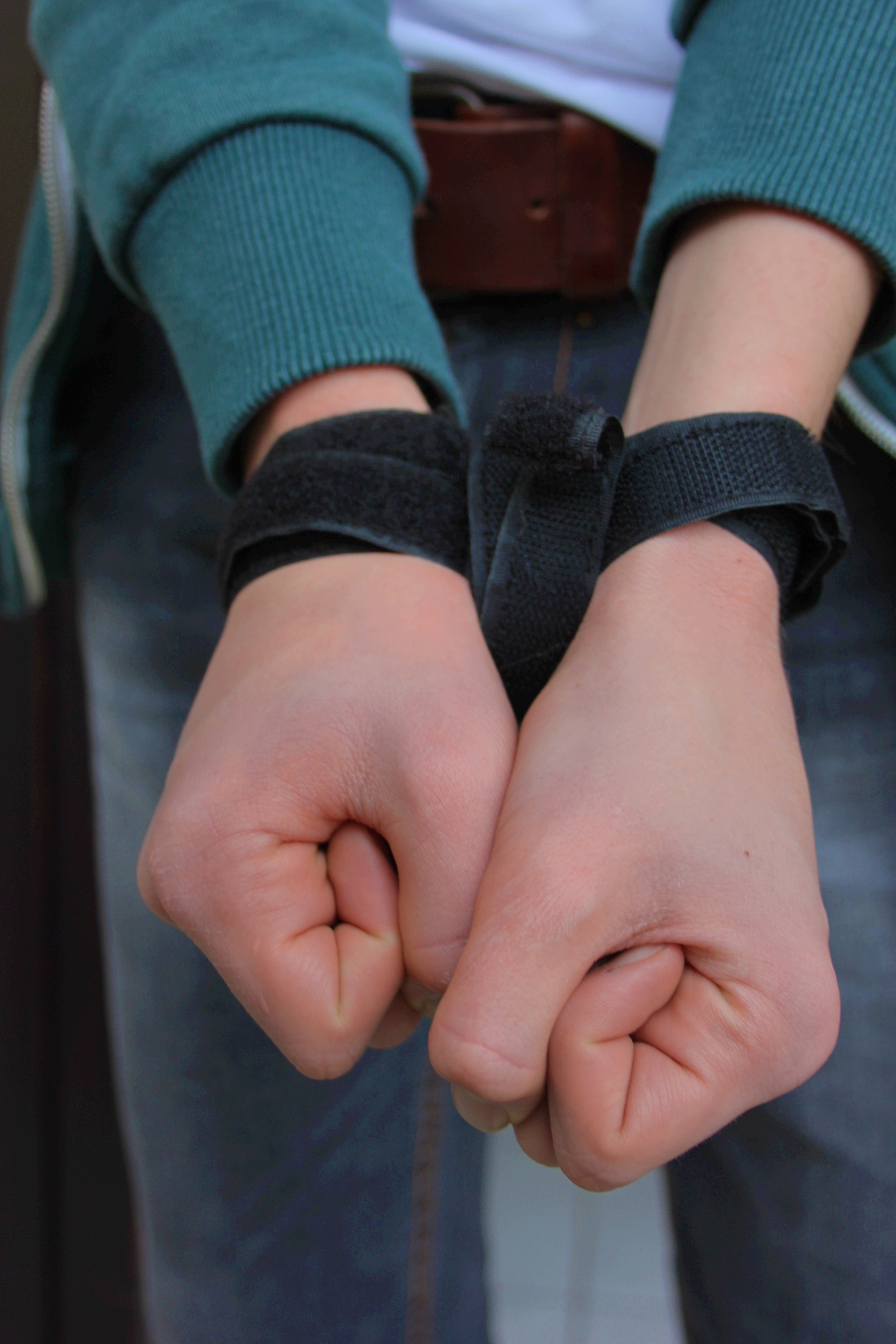 Arme mit Klettfesseln fixiert.